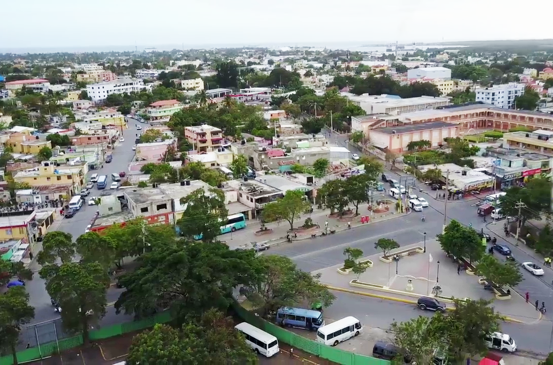 Parque de la Biblia